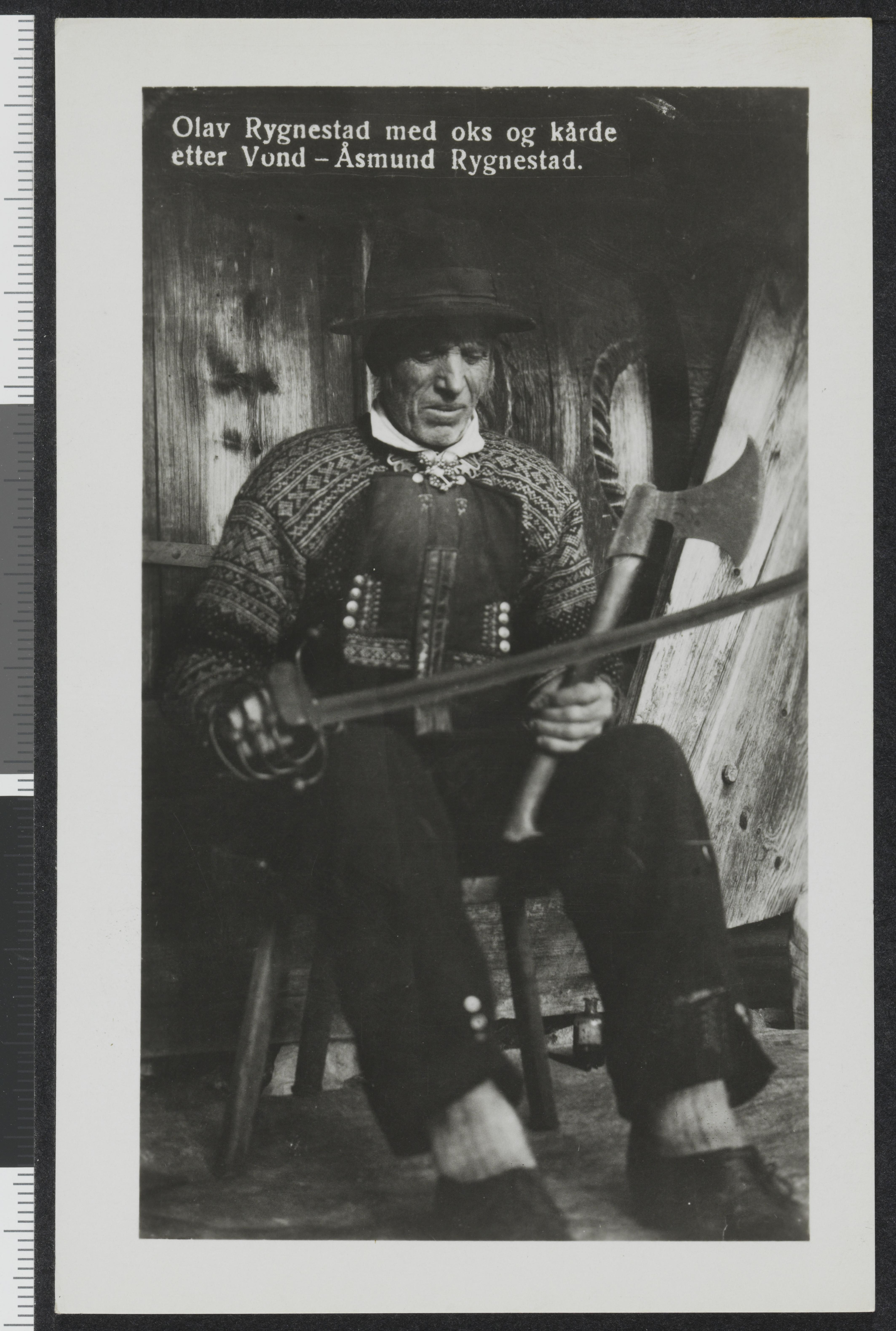 Bildet er hentet fra Nasjonalbibliotekets bildesamling Setesdal, Aust-Agder